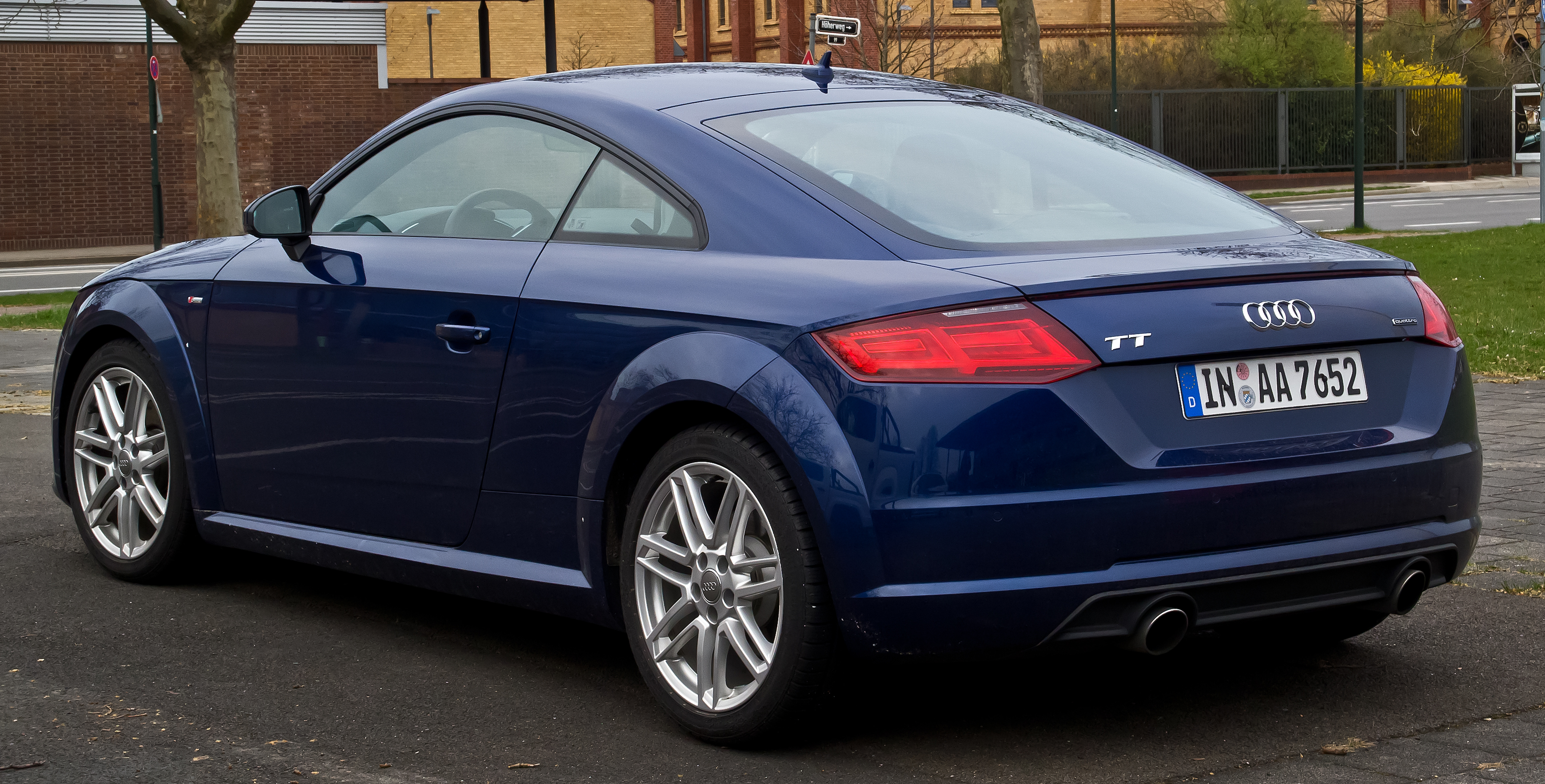 Audi TT Coupé 2.0 TFSI quattro S-line (8S)